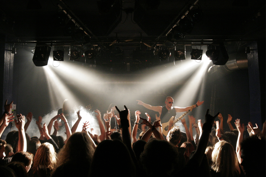 Heavy-Metal-Band The Mystery aus Heiligenhaus